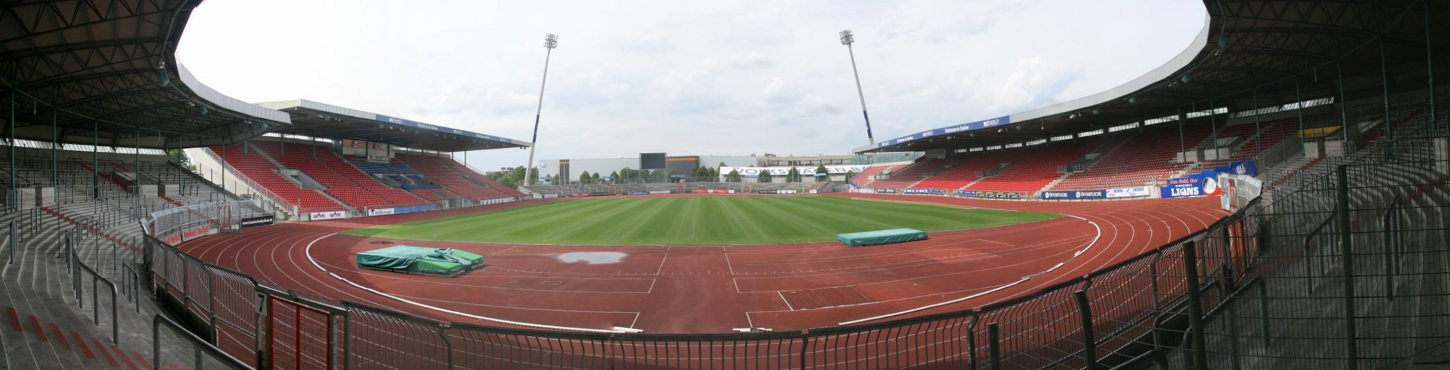 Eintracht-Stadion, Braunschweig. Standort: Südkurve